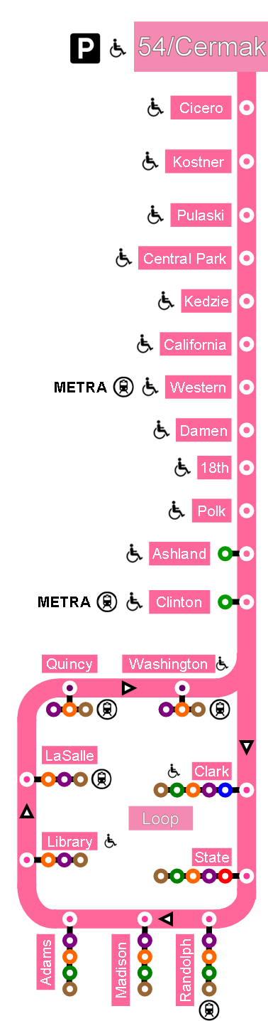 Plan de la pink line du métro de chicago